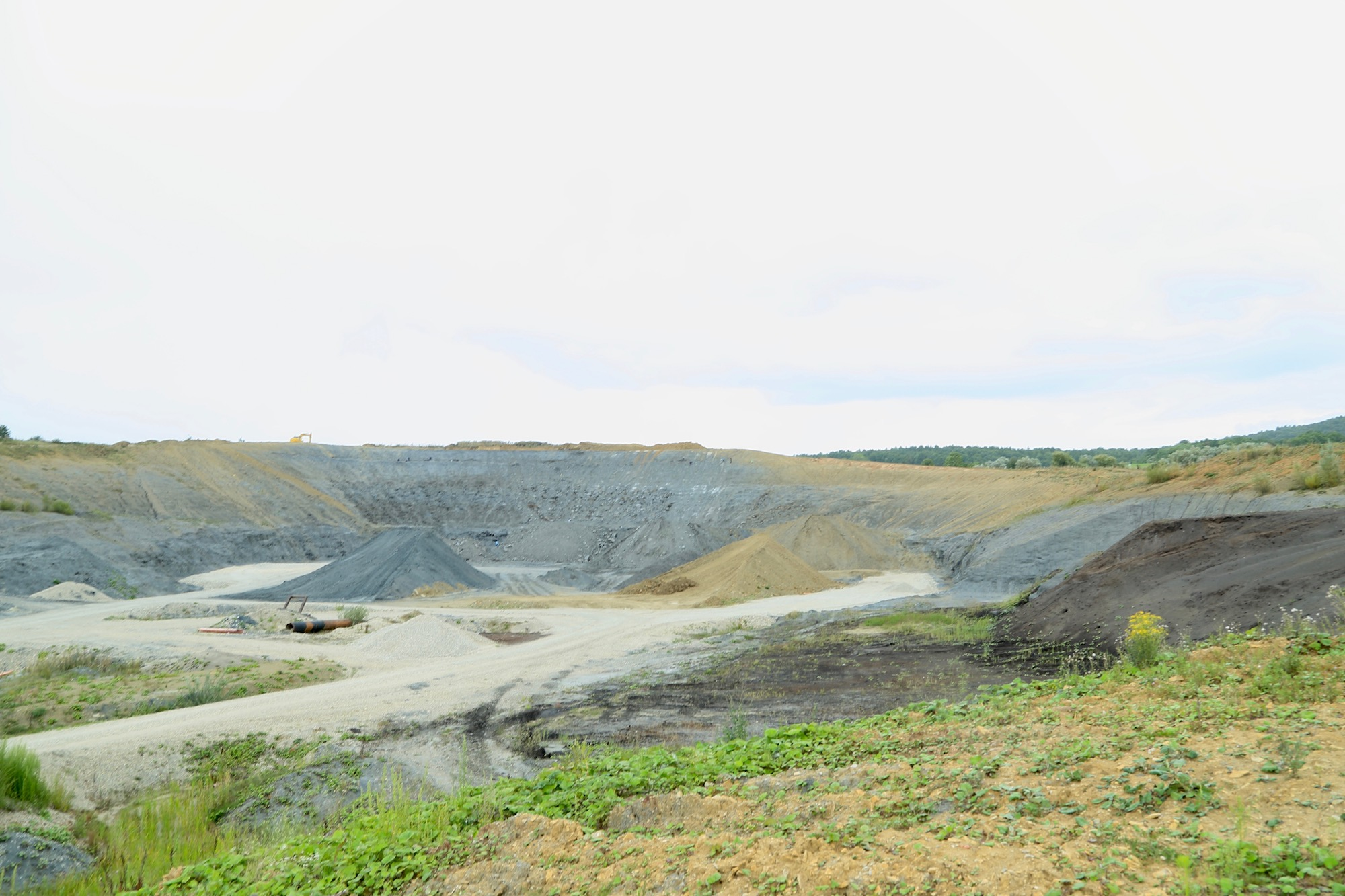 Tongrube Holzbachacker SE von Buttenheim Geotop Nr.: 471A015 Unterer Jura (Schwarzer Jura-Lias)/Lias Delta (Amaltheenton-Pliensbachium) bis Epsilon (Unteres Toarcium). Geotope im Landkreis Bamberg